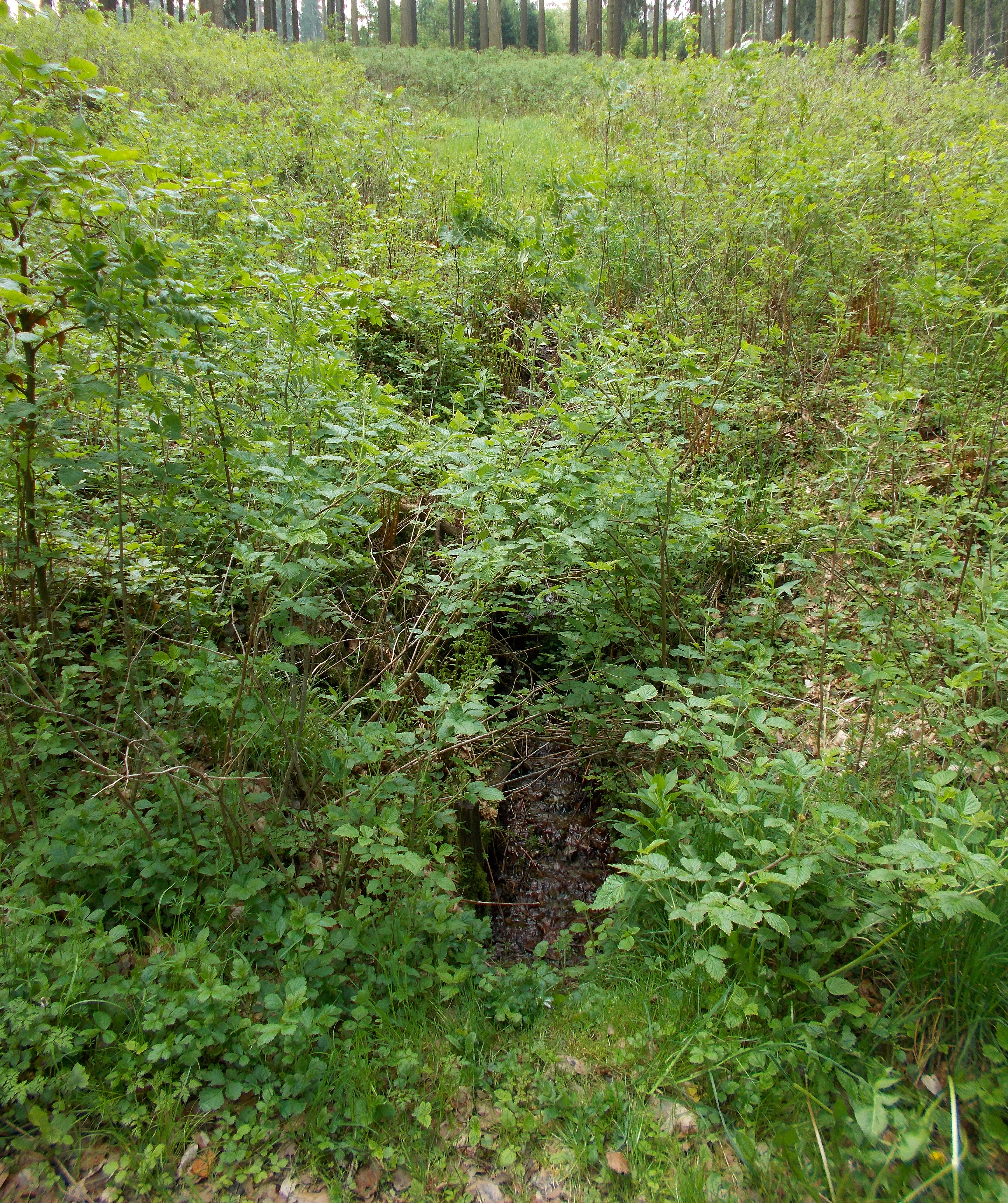 Hennequelle im Naturschutzgebiet Quellgebiet der Henne im Stadtgebiet Schmallenberg